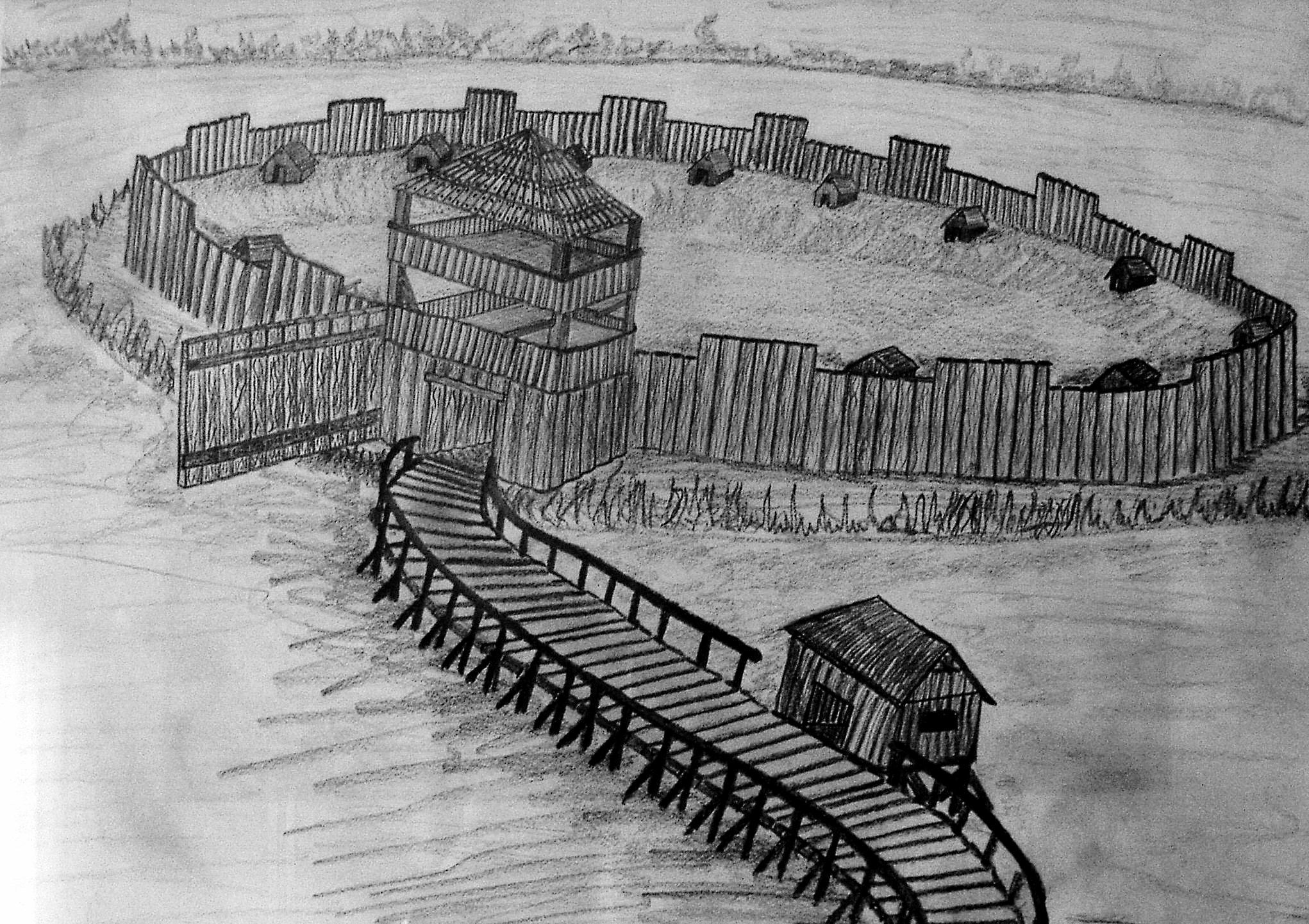 slawische Inselburg aus dem 10./12. Jahrhundert